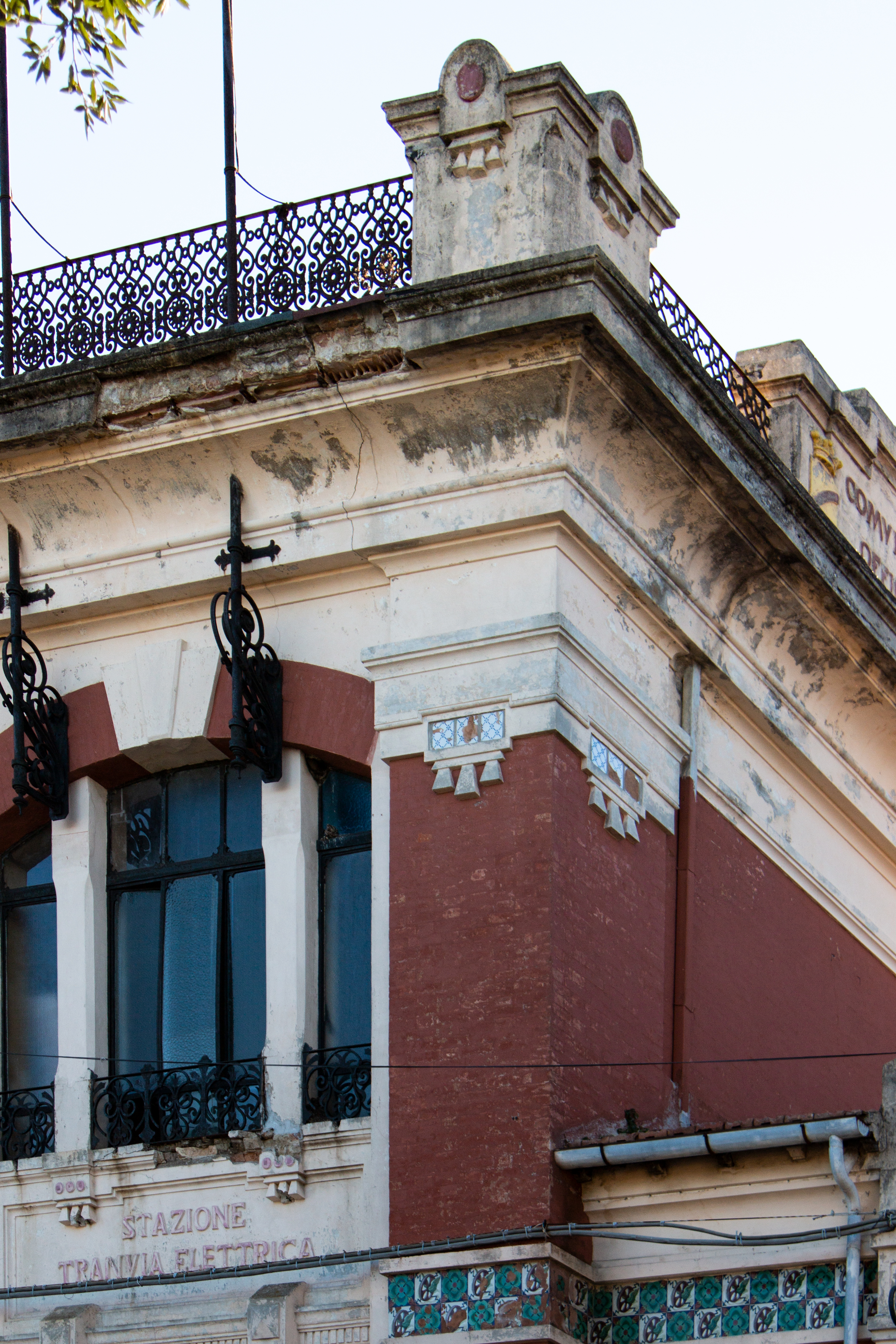 Palazzo della tranvia Completato nel 1910 in stile liberty This is a photo of a monument which is part of cultural heritage of Italy.